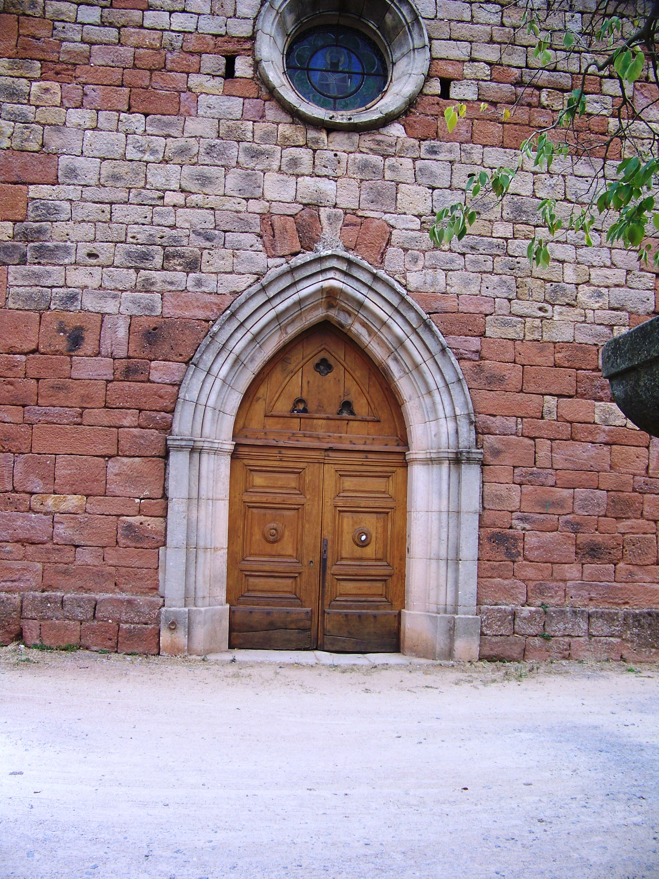 Belle église à proximité de Faugères (Ardèche)